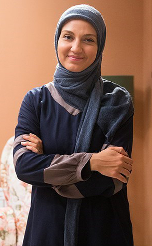 حدیث میرامینی در پشت صحنه سریال هیات مدیره